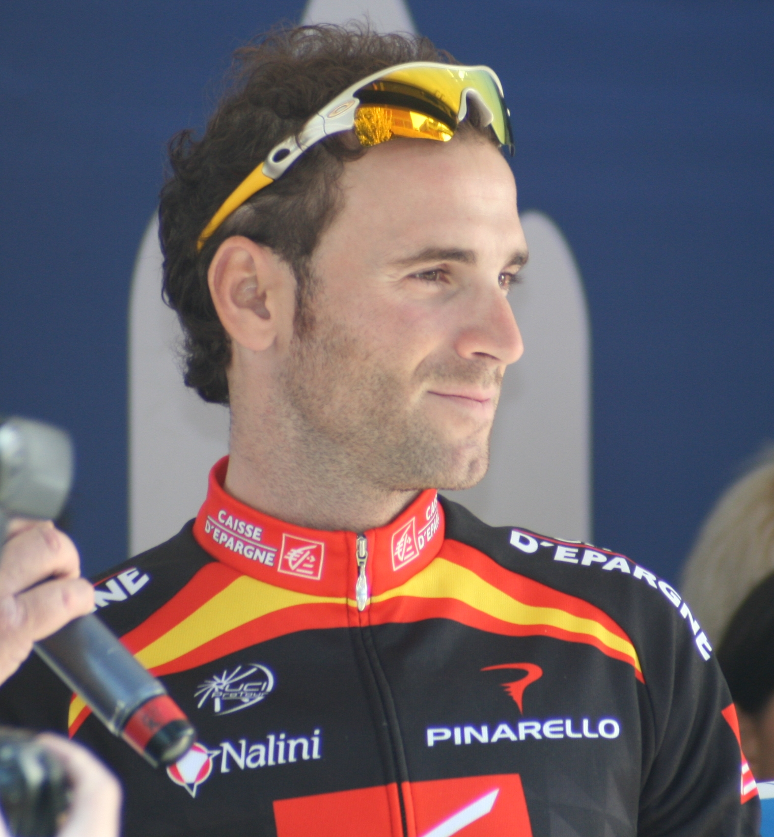 Alejandro Valverde, à la Roue des As 2008 à Marquette-lez-Lille (France)